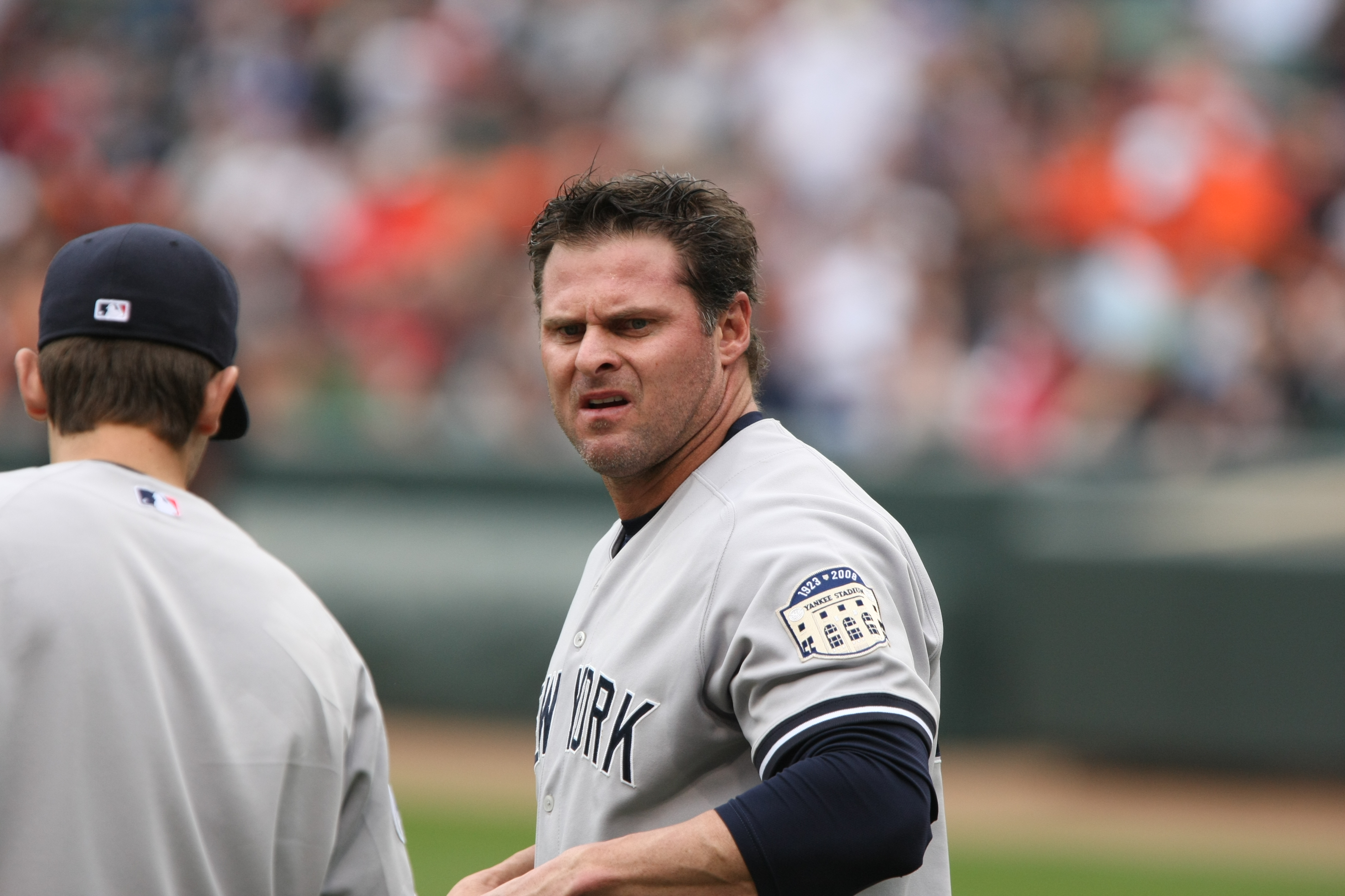 AAAA9381